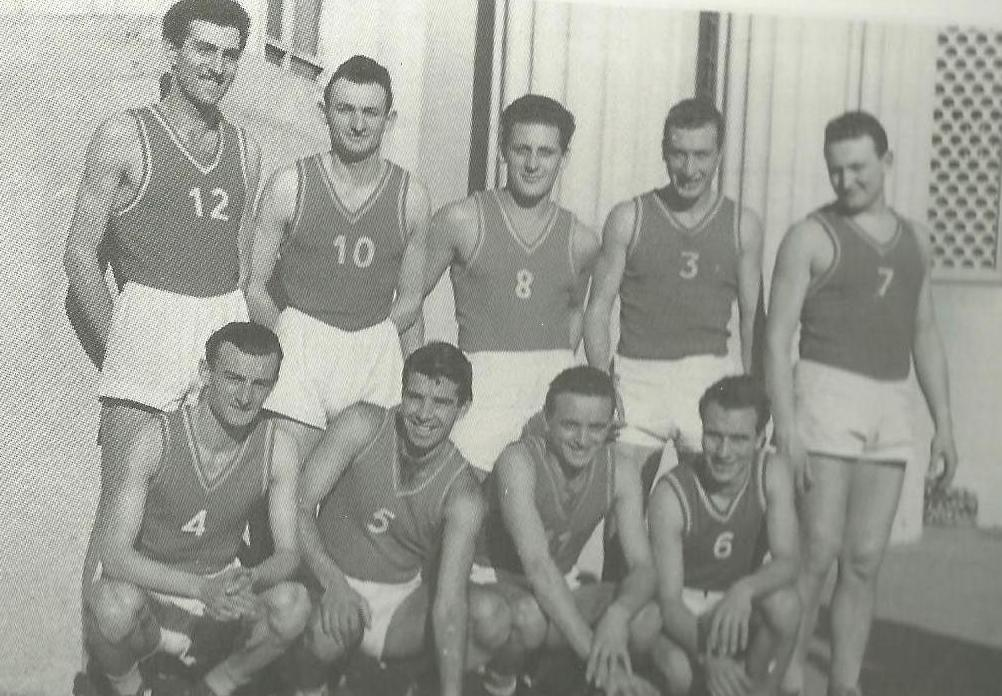 Formazione della Pallacanestro Varese nel primo campionato a girone unico di Serie A, 1948-49. Da sinistra, Fagarazzi, A. Giobbi, Marelli, Cerioni, Checchi, accosciati V. Giobbi, Tracuzzi, Clerici e Pegurri. Licensing 1948 Categoria:Immagini di Vittorio Tracuzzi Categoria:Immagini di Sergio Marelli